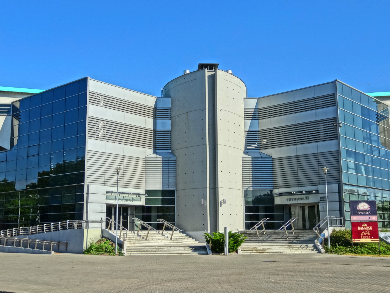 Hala widowiskowo-sportowa "Łuczniczka" w Bydgoszczy - widok od strony południowo-wschodniej